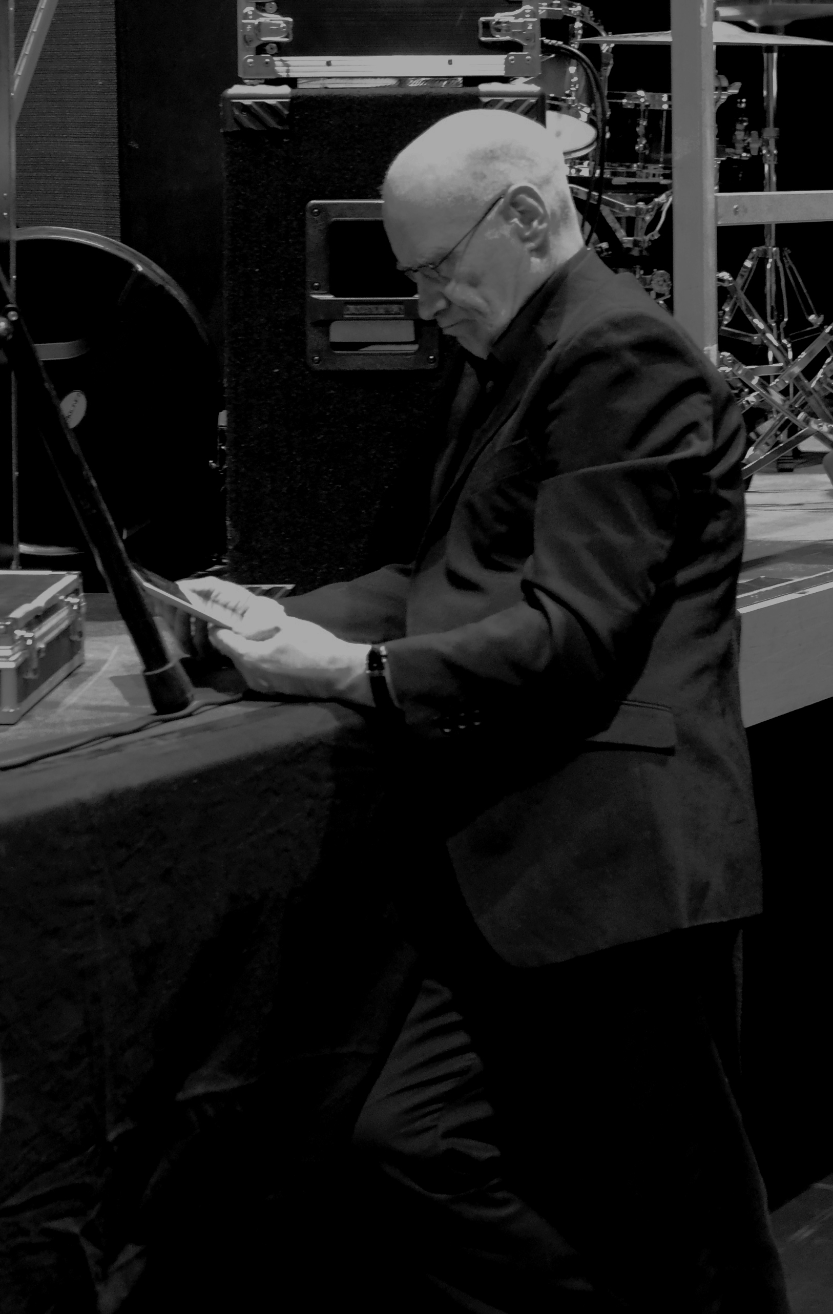 Wiko's just a modern guy